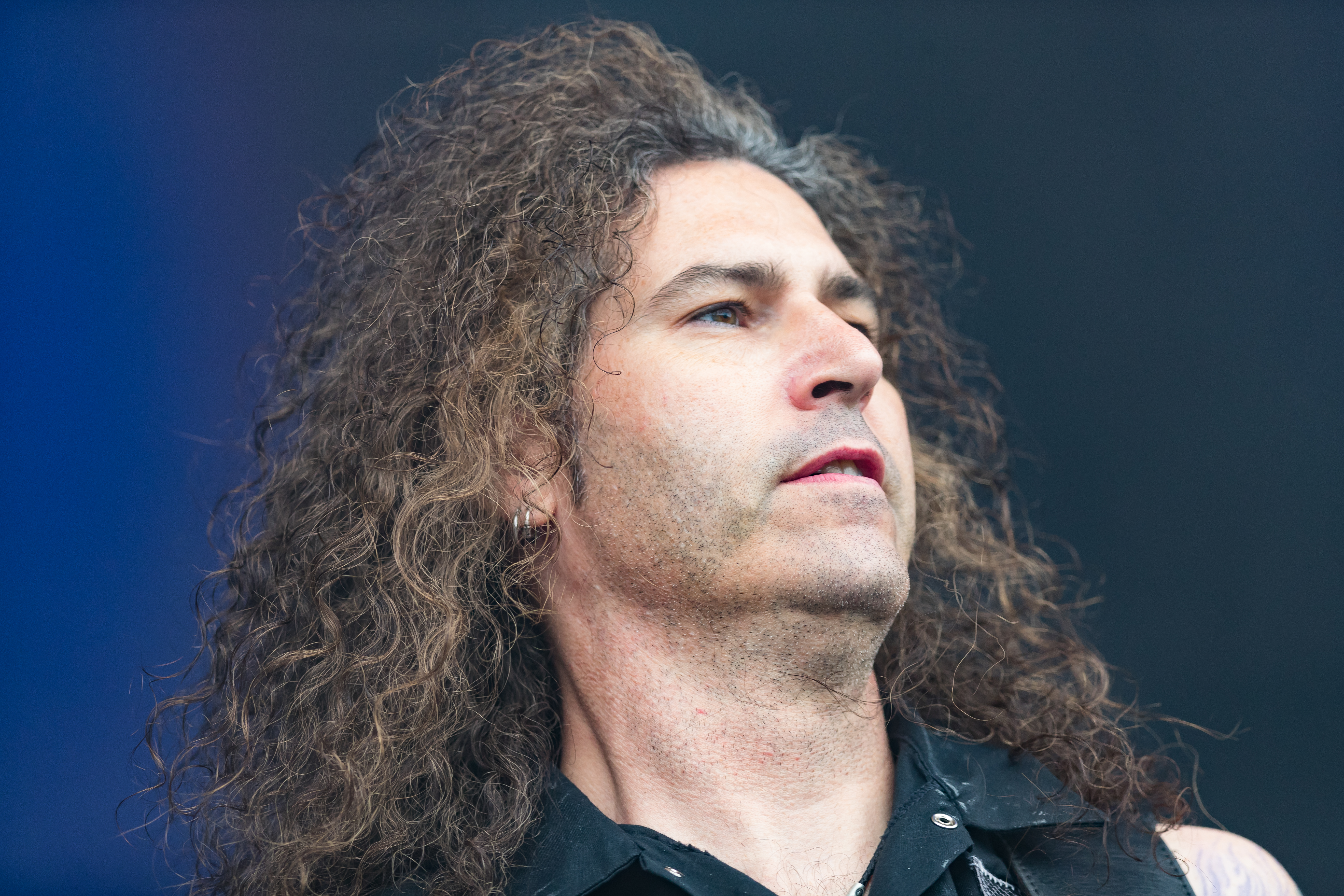 Sanctuary during Wacken Open Air at Schleswig-Holstein, Wacken, , Germany on 2017-08-04, Photo: Sven Mandel